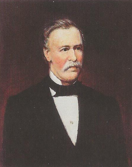 Porträt von Friedrich Hartner (1811–1877), im Studienjahr 1867/68 Rektor des k.k. Polytechnischen Institutes Wien